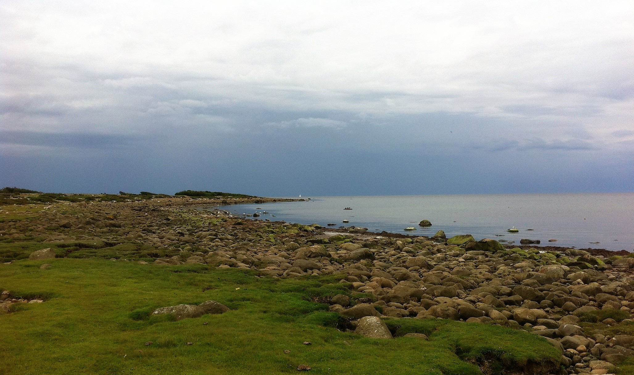 Enets naturreservat vid Steninge, Hallandskusten